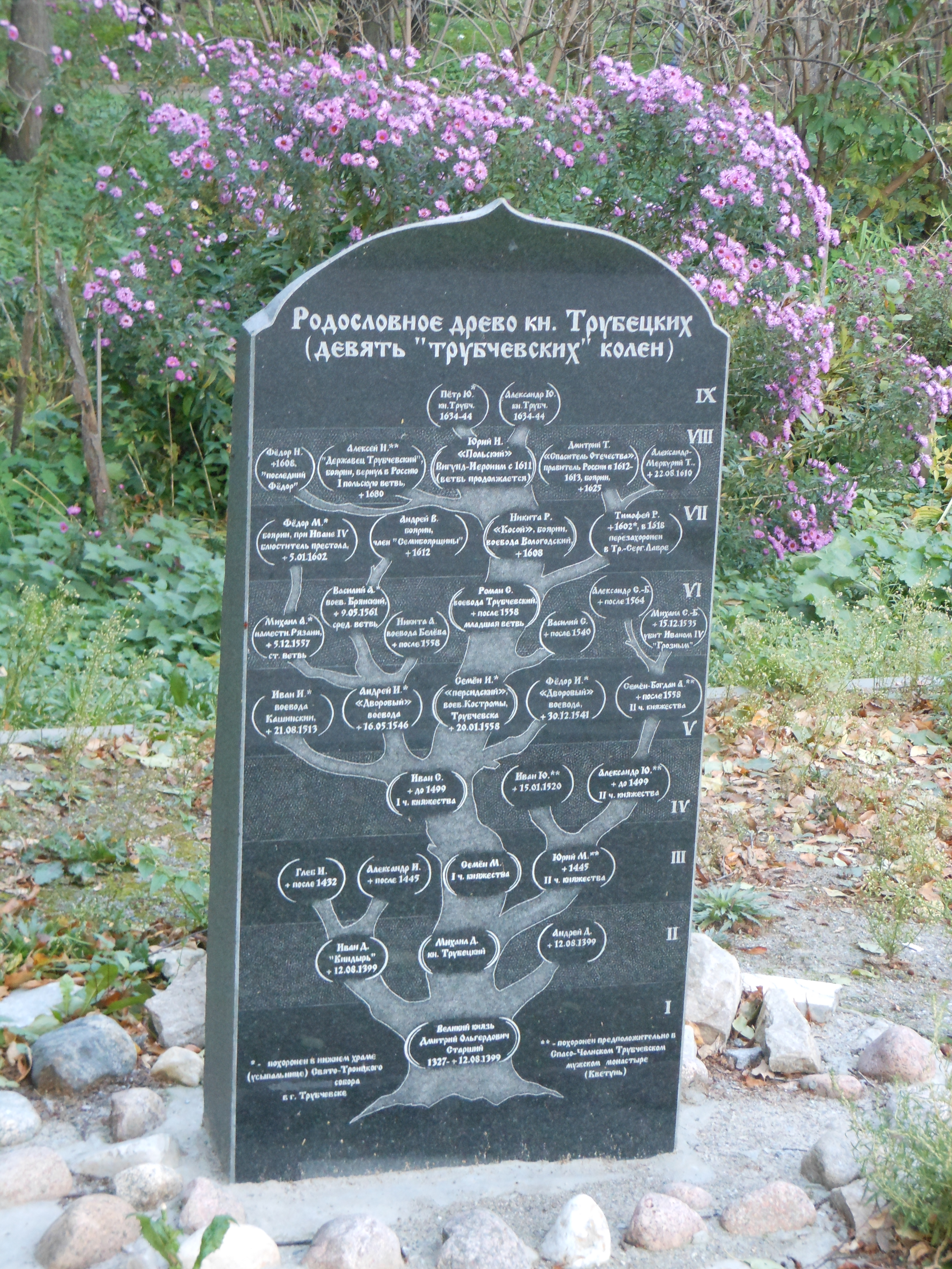 Входит в композицию Троицкого Собора